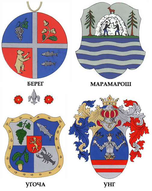 Комітати Угорського королівства, заселені перважно українціями